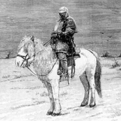 Serko et Pechkov Dans la revue Journal des Voyages (Paris), 28 septembre 1890, page 205